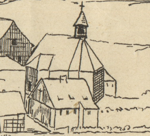 Aus dem Bild "Klingenthal 1726" Auf diesem Bild sieht man die alte "Kirche zum Friedefürsten" in Klingenthal/Sa.